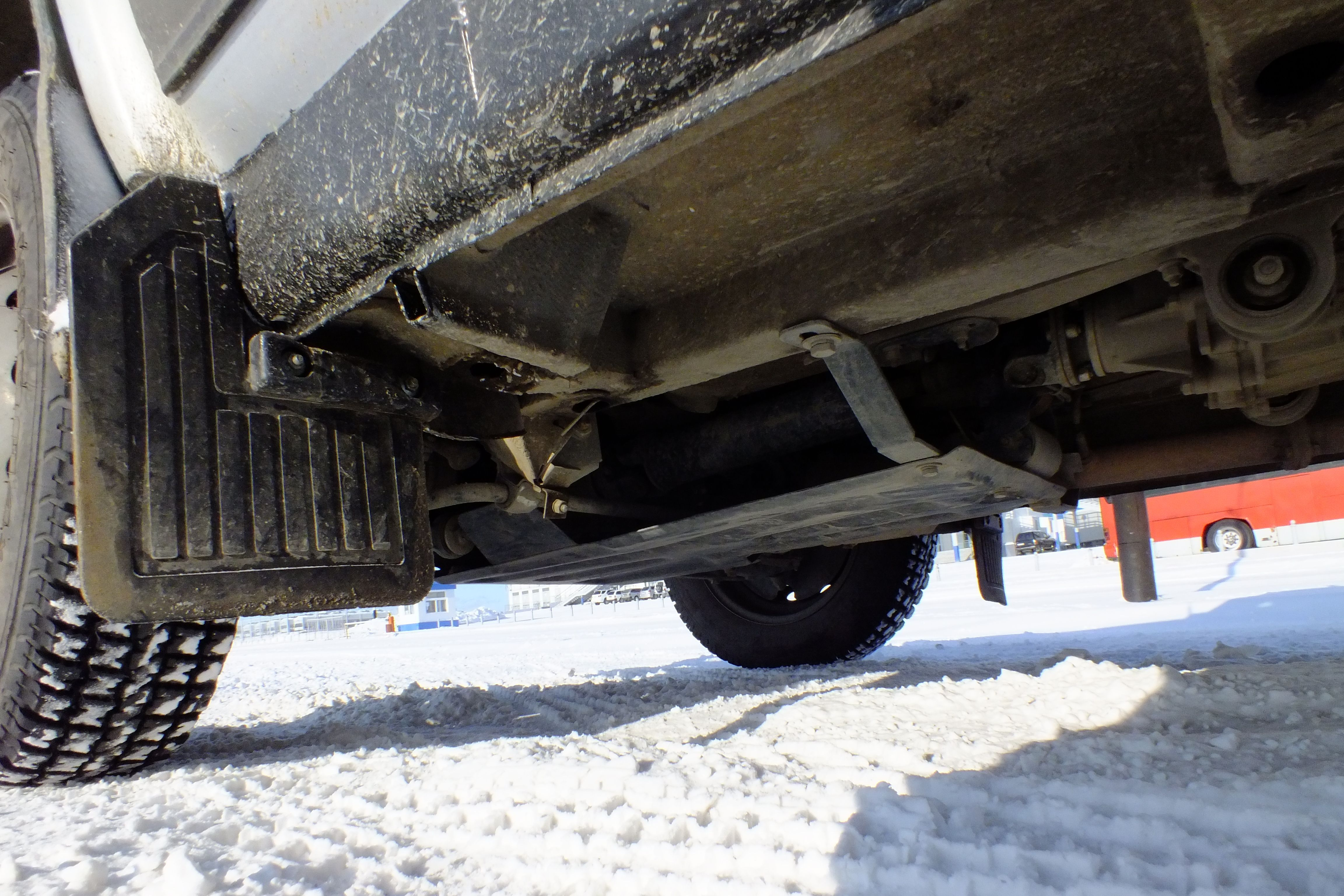 Lada Niva 2131